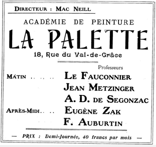 Encart publicitaire pour l'Académie de la Palette (Paris) paru dans La Revue de France et des pays français en mars 1912.